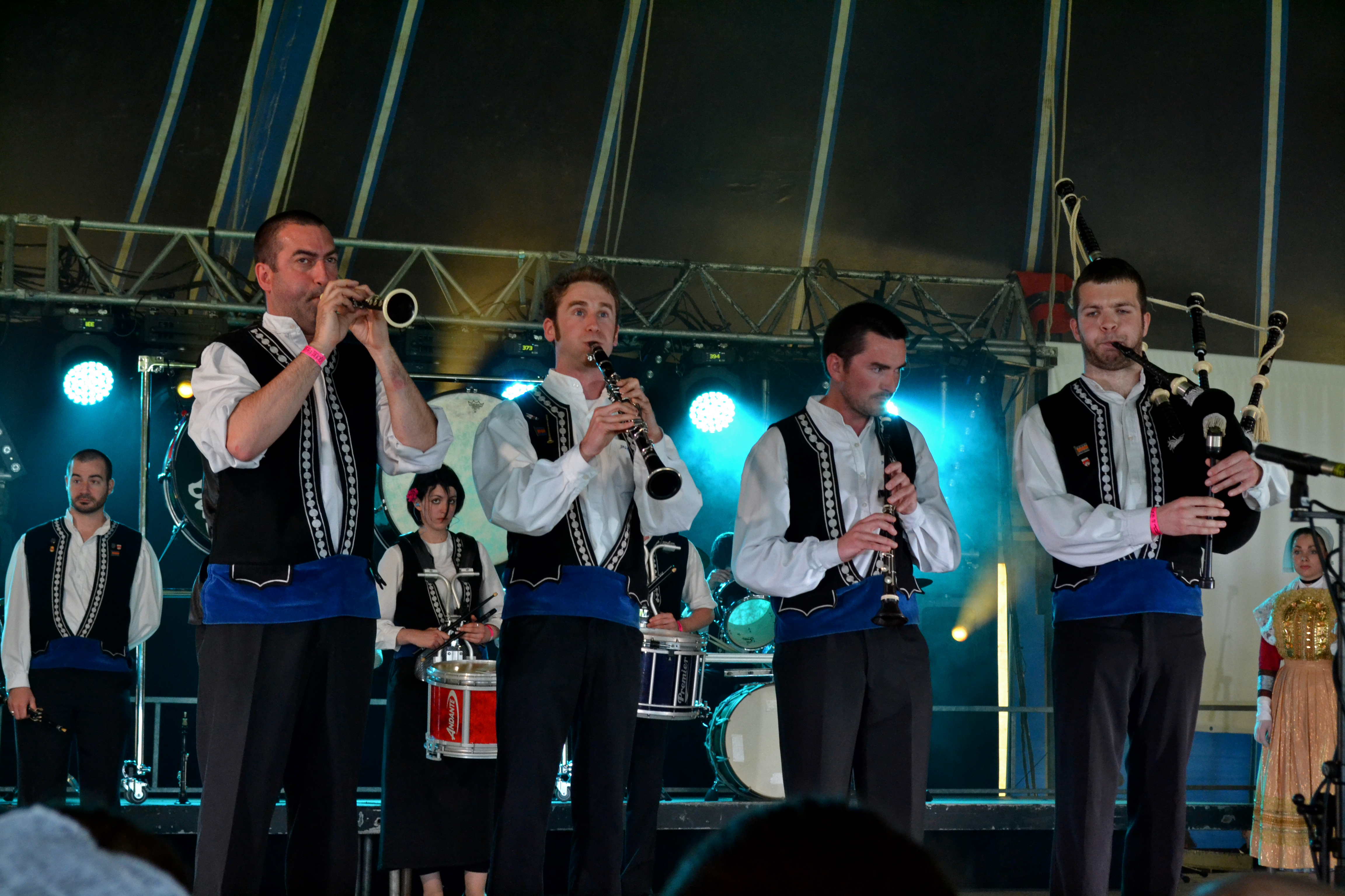 Le bagad Landi au Gouel Bro Leon à Plouvorn le 16 juin 2013.